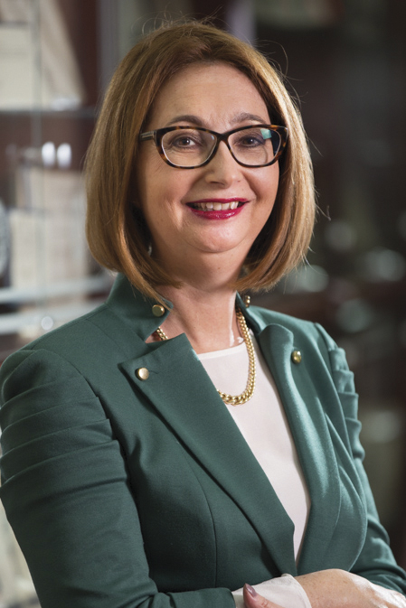 Српски (ћирилица): др Гордана Ковачек Станић